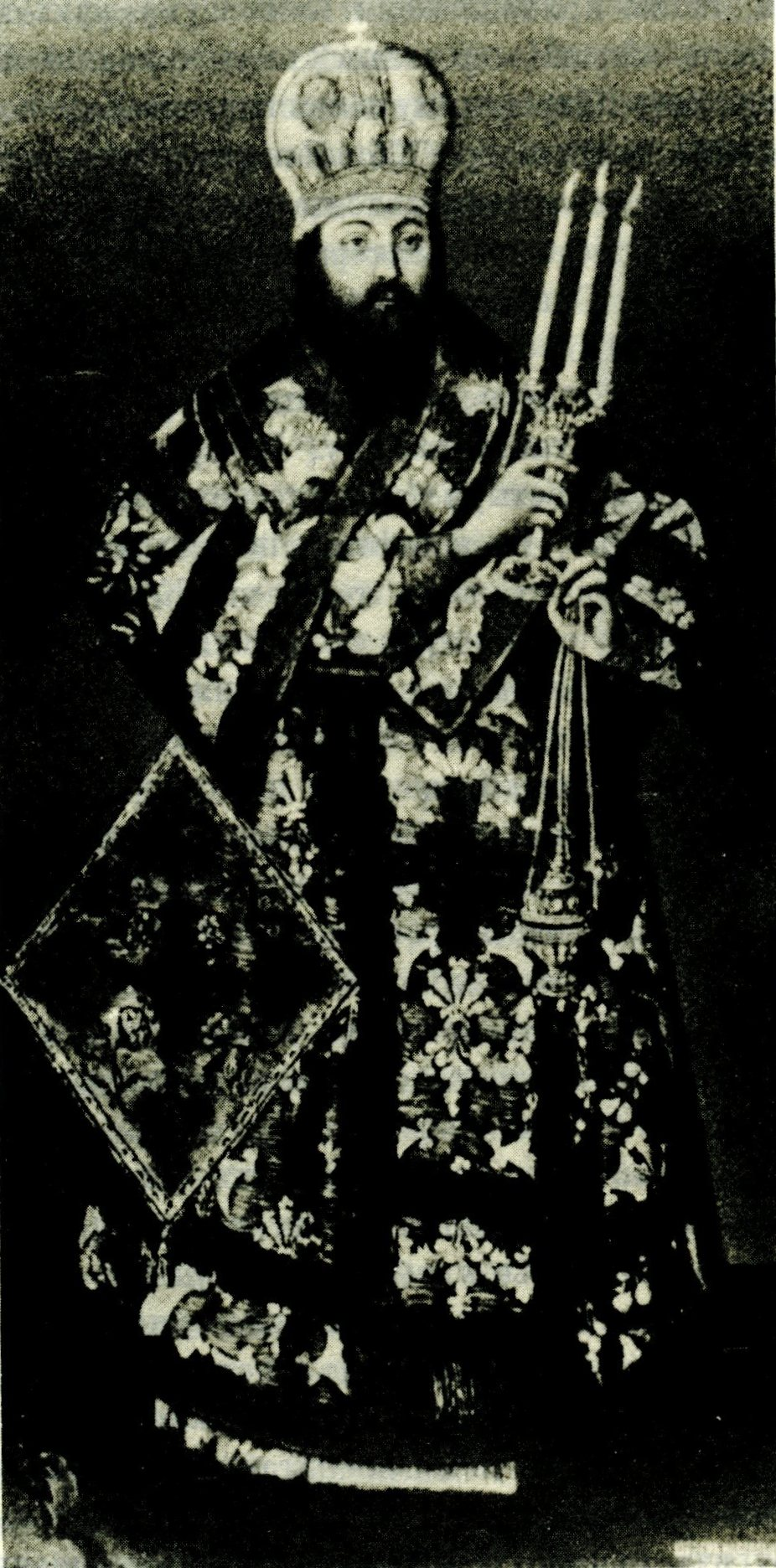 Епифаний (Тихорский), епископ Белоградский.